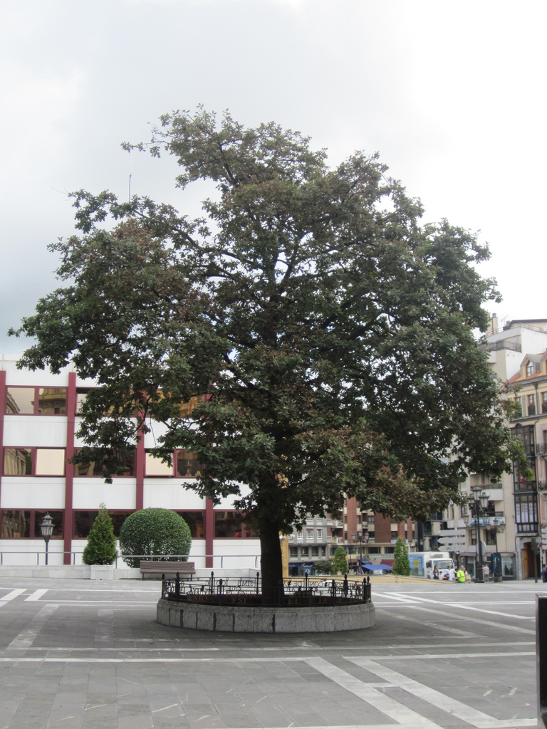 El Carbayón. Oviedo. España